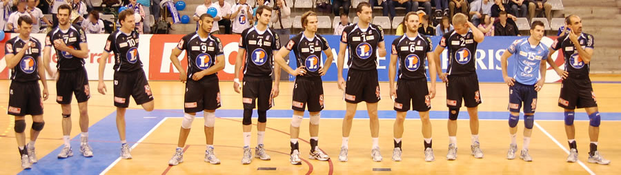 Equipe de volley-ball du Tours VB à l'occasion de la demi finale du championnat de France pro A saison 2008/2009.